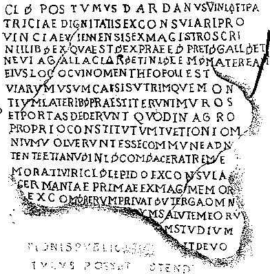 Transcription sur texte imprimé du texte latin de la dédicace de Claudius Postumus Dardanus.